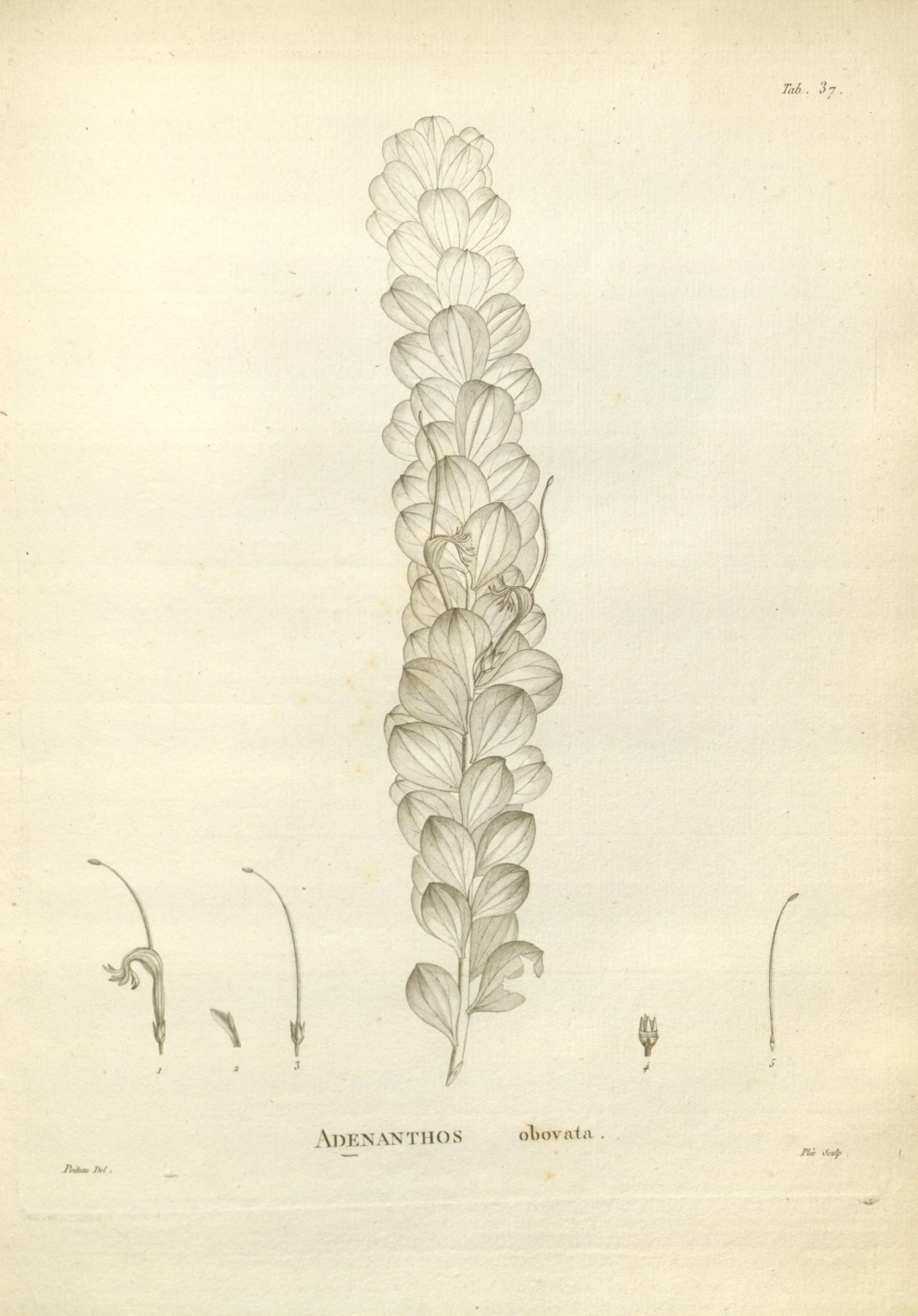 h «■? AdKNANTHOS oWaU